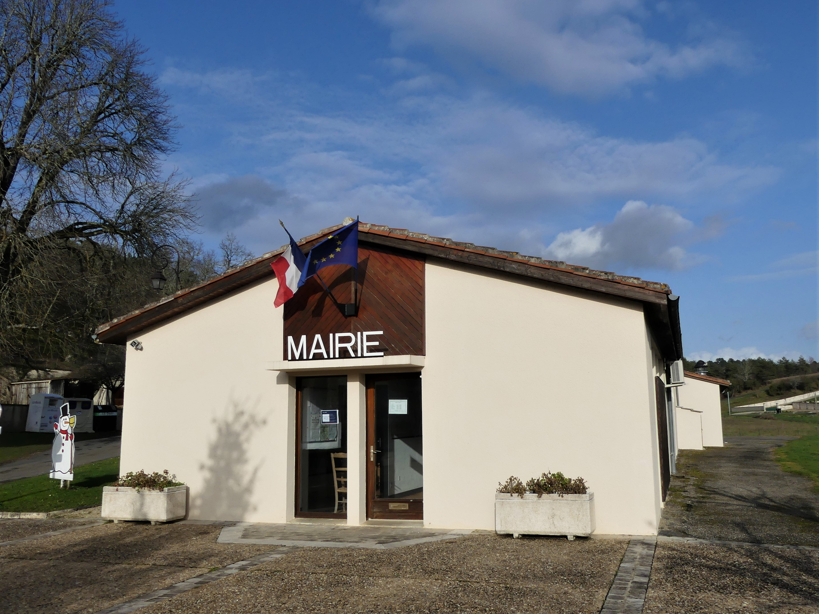 La mairie de Bussac, Dordogne, France.